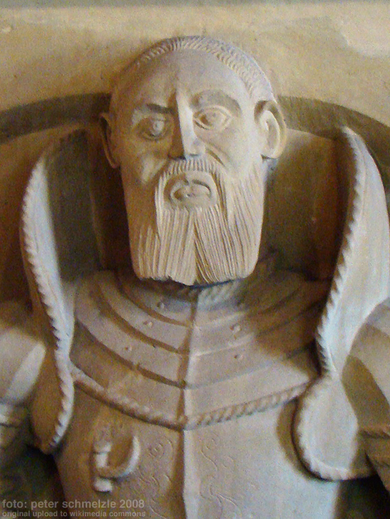 Grabdenkmal des Philipp von Helmstatt in der Totenkirche Neckarbischofsheim